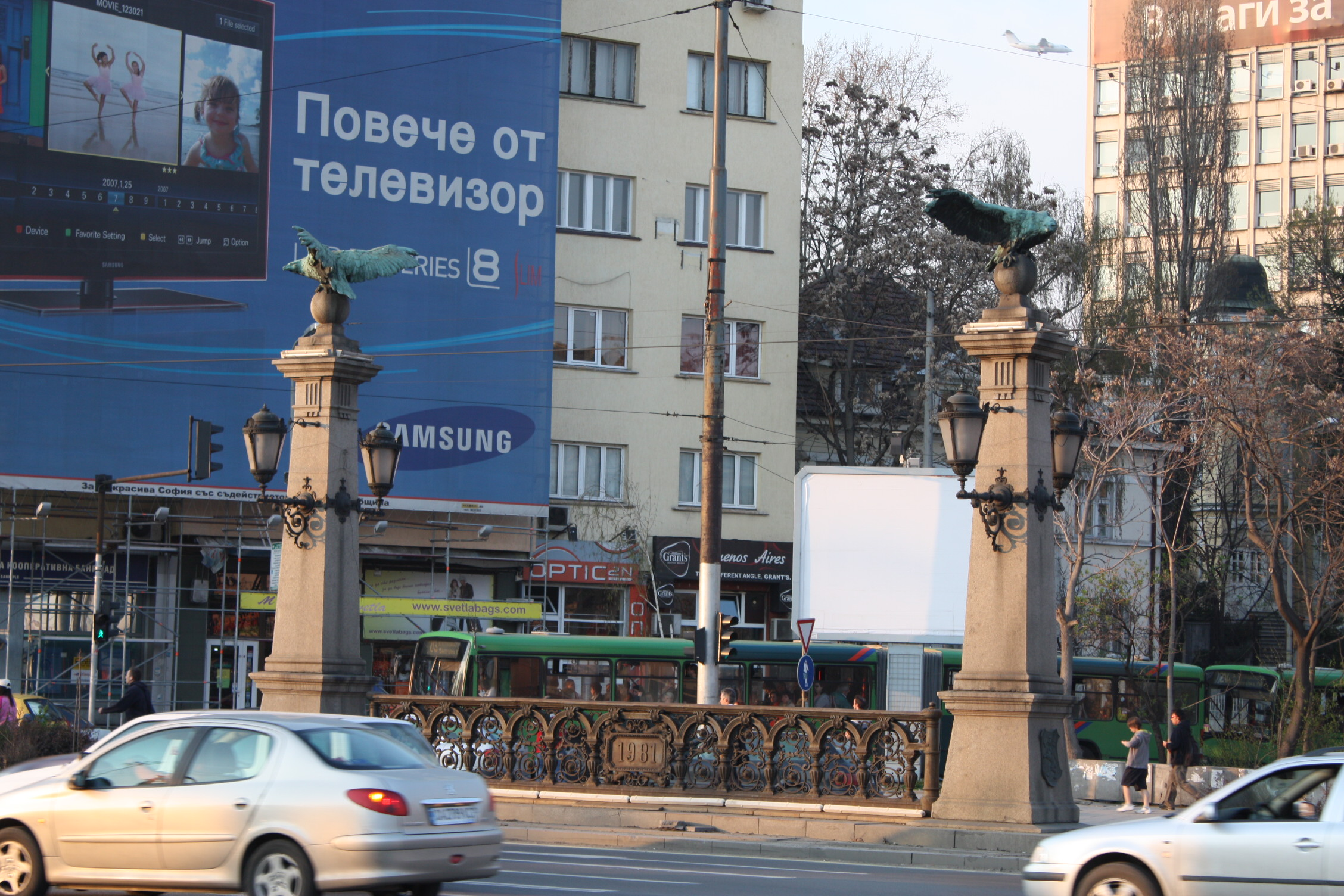 Adlerbrücke, Orlov most, Орлов мост, Sofia, Bulgaria